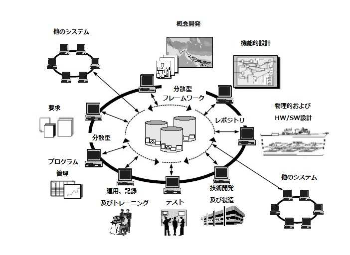 システム工学の基礎